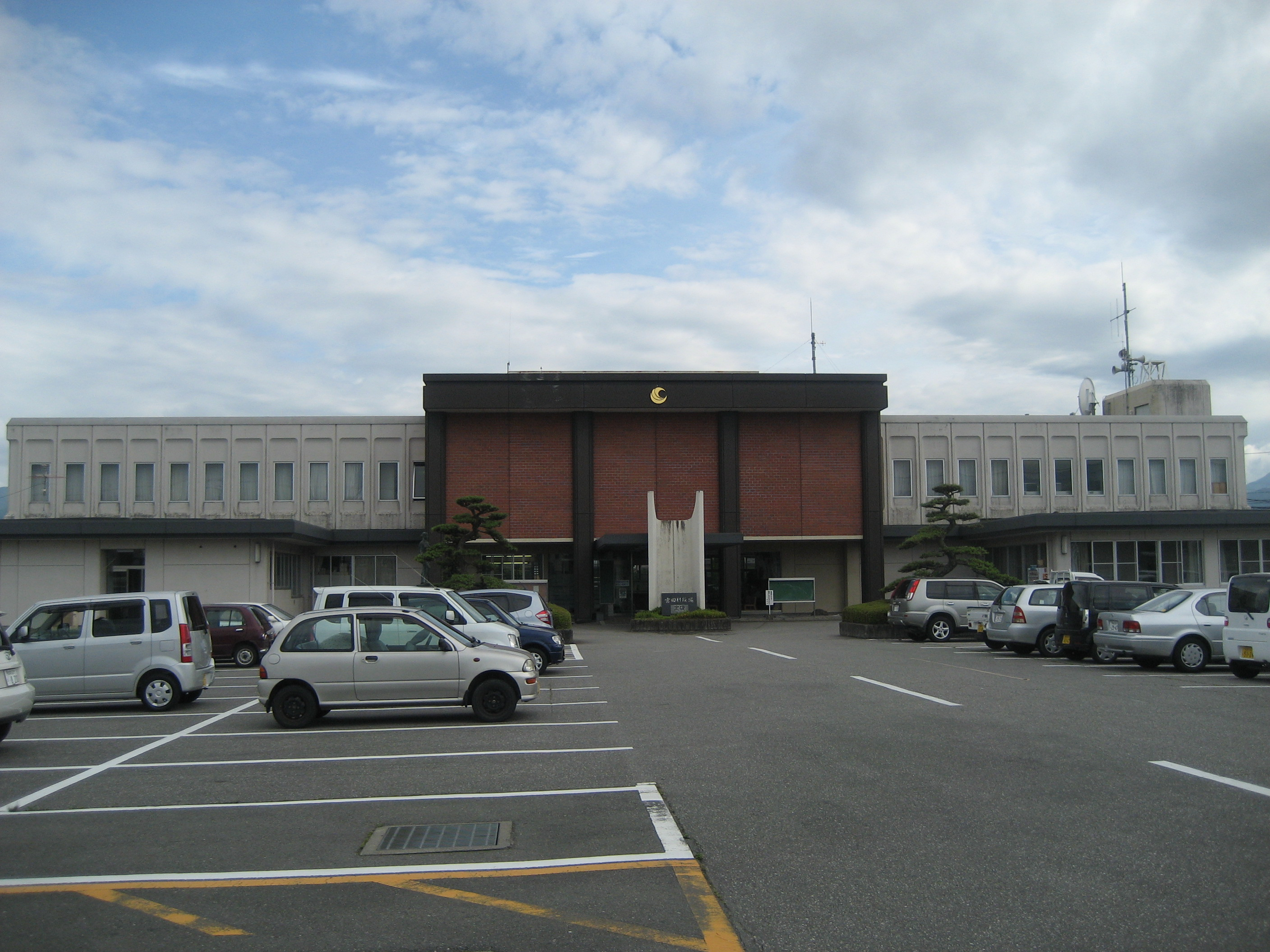 長野県宮田村役場庁舎